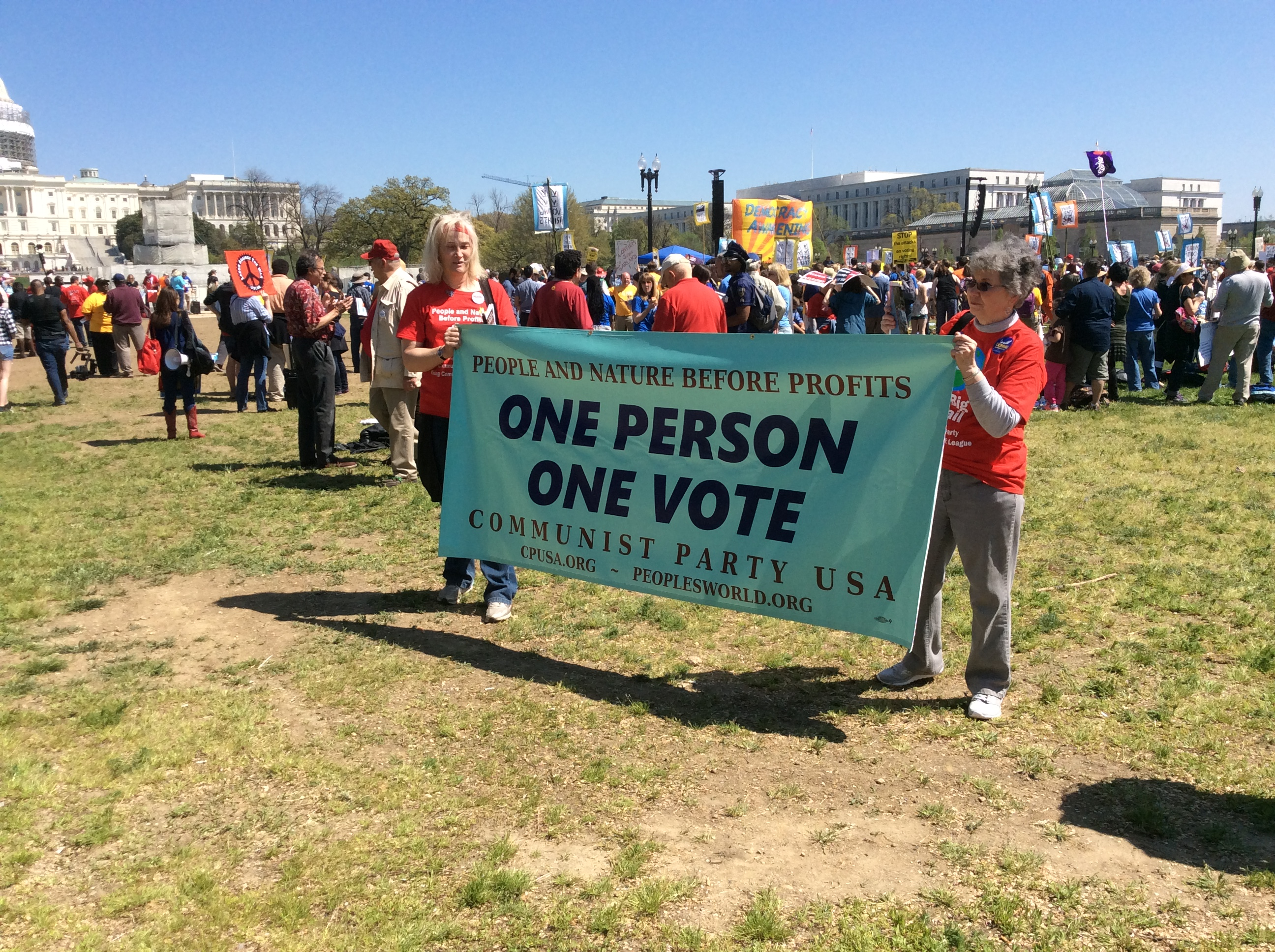 U.S. Capitol Building Washington, DC April 17, 2016